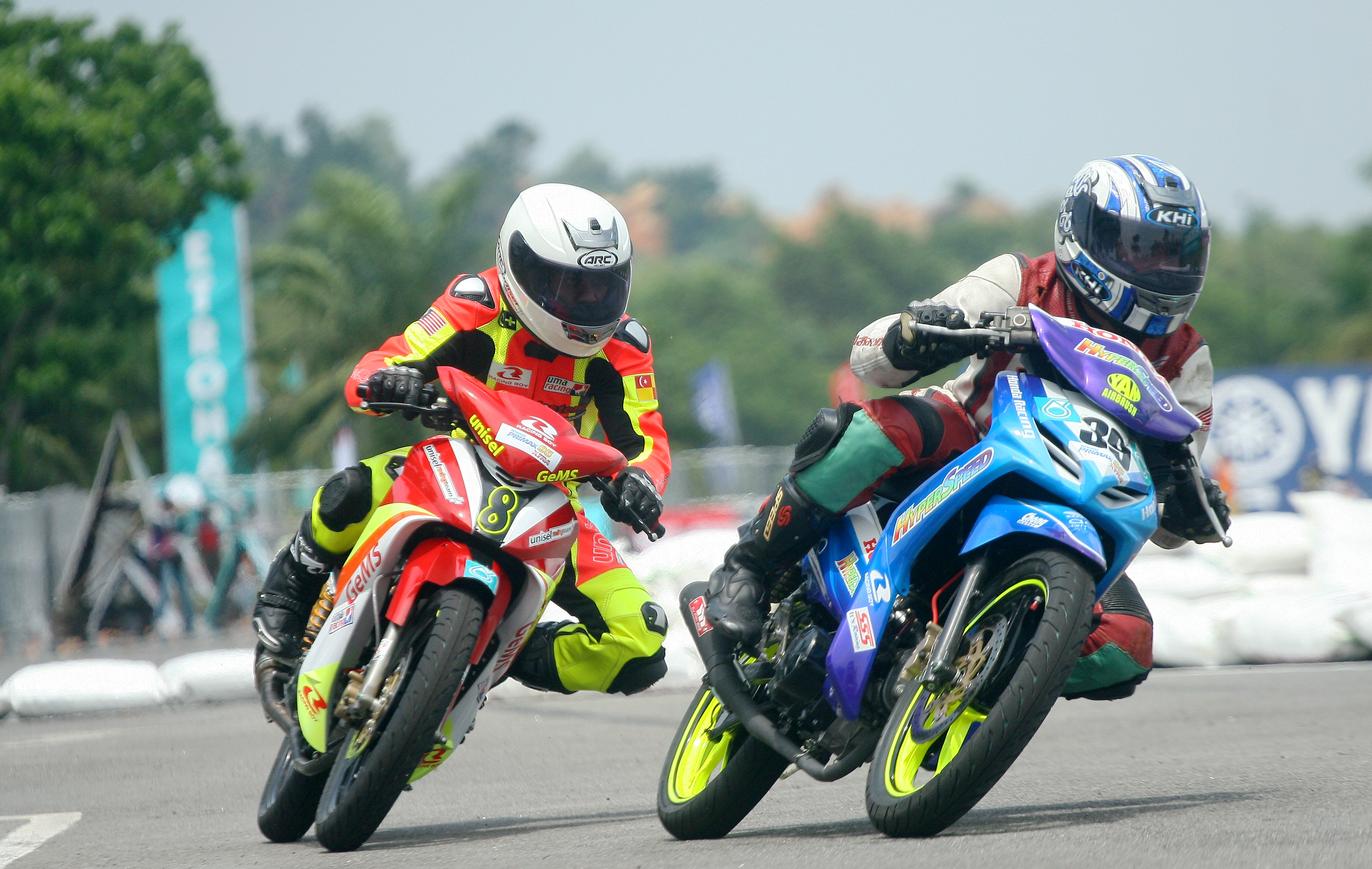 cub prix stadium batu kawan pulau penang